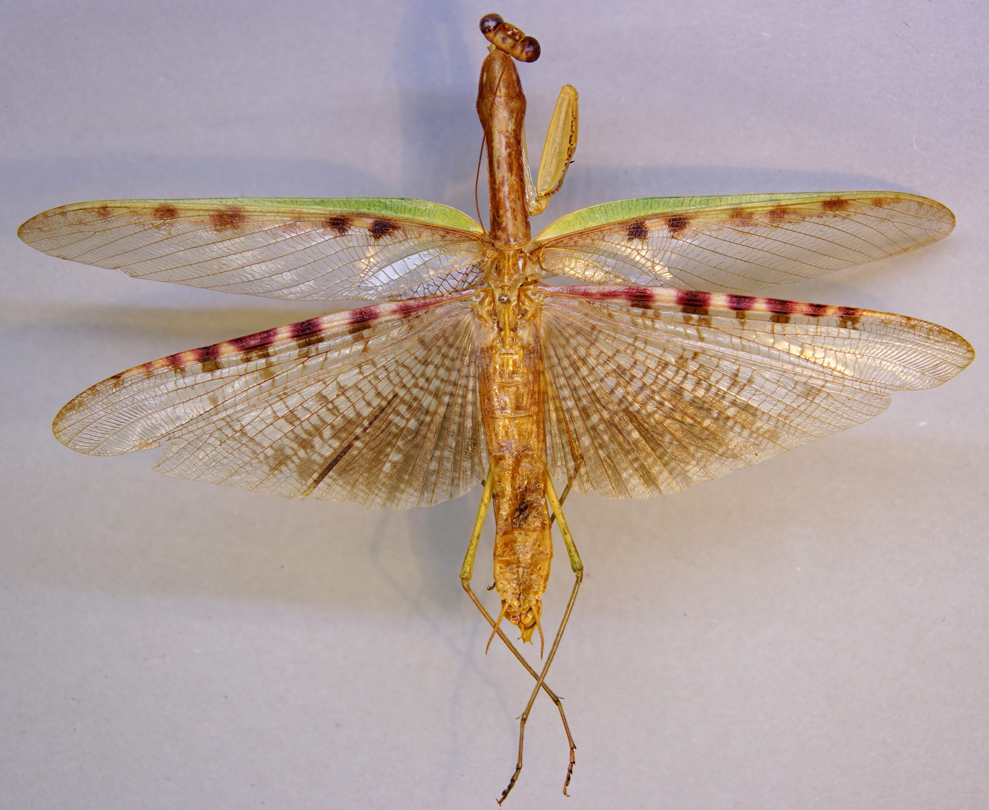 Polyspilota aeruginosa (Goeze,1778) ♂ Herkunft: Kenia, Malindi